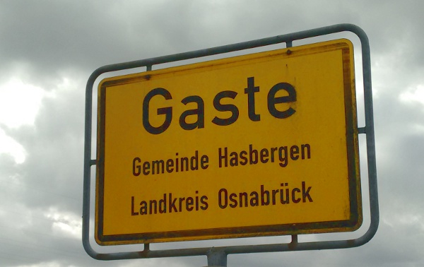 Въезд в Гасте со стороны г. Оснабрюк